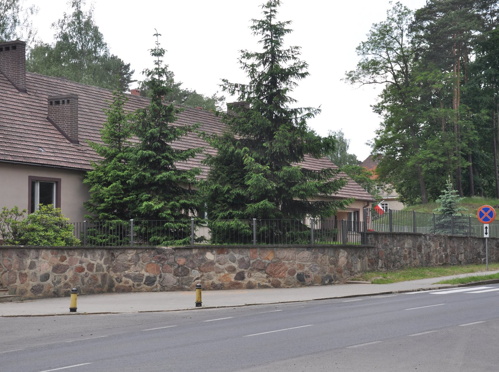 Wędrzyn koszary